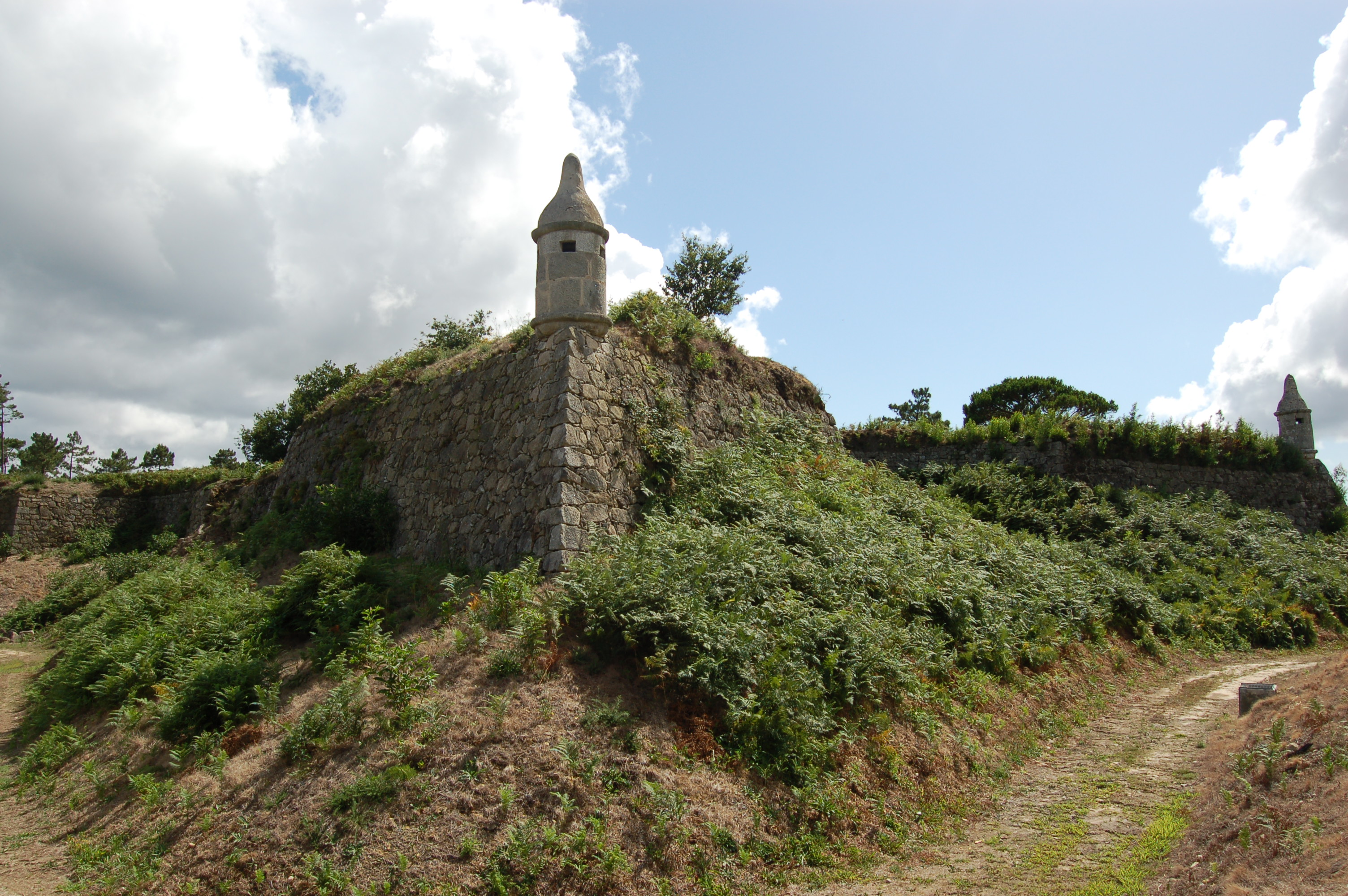 Forte de San Francisco de Lovelhe, en Lovelhe (Portugal).